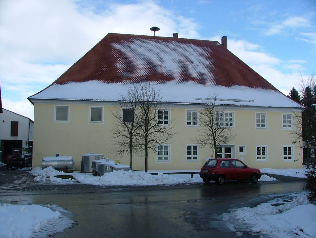 Pleß Alter Pfarrhof